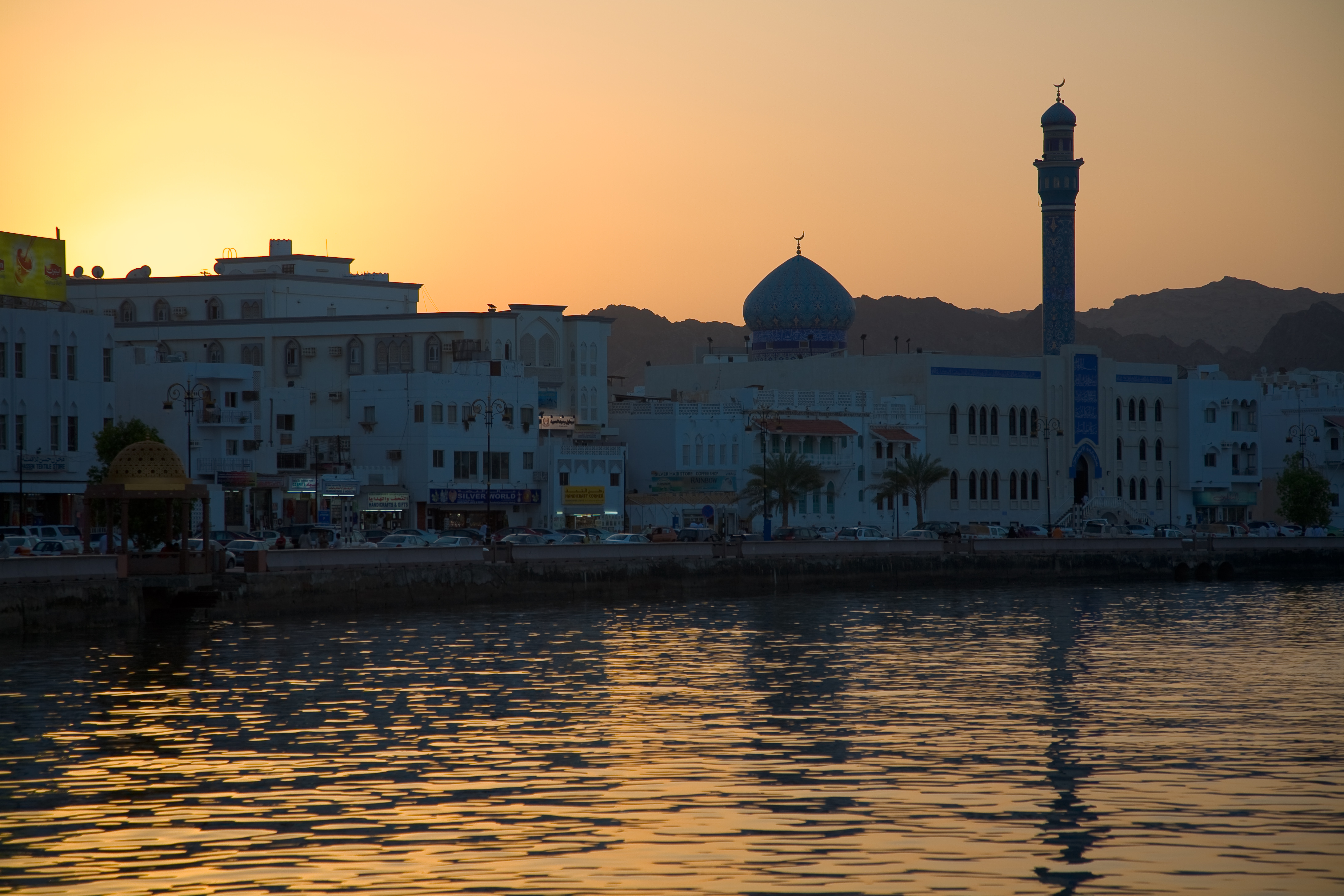 Muttrah, Muscat, Oman